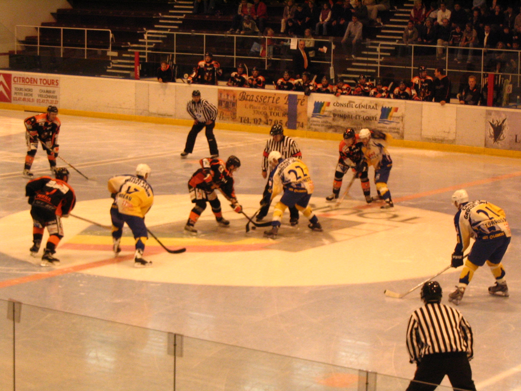 Match Diables noirs de Tours vs Chamois de Chamonix